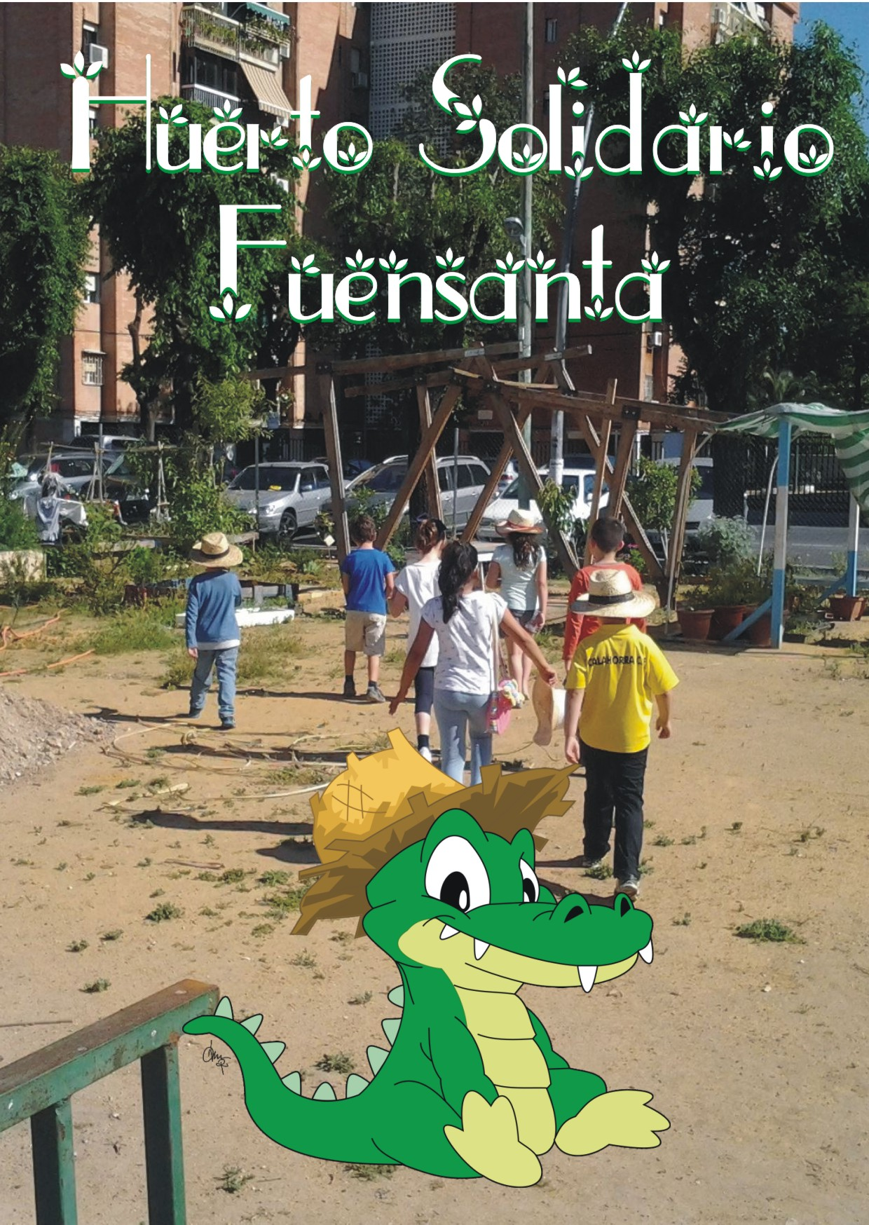 Huerto Solidario Fuensanta